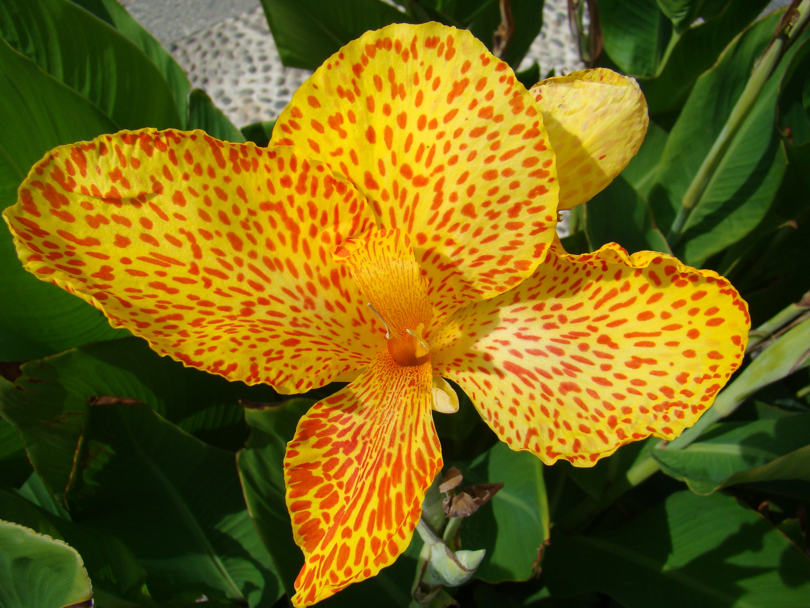 Florecilla fotografiada en el trascurso de un viaje a Sicilia. Septiembre de 2008.